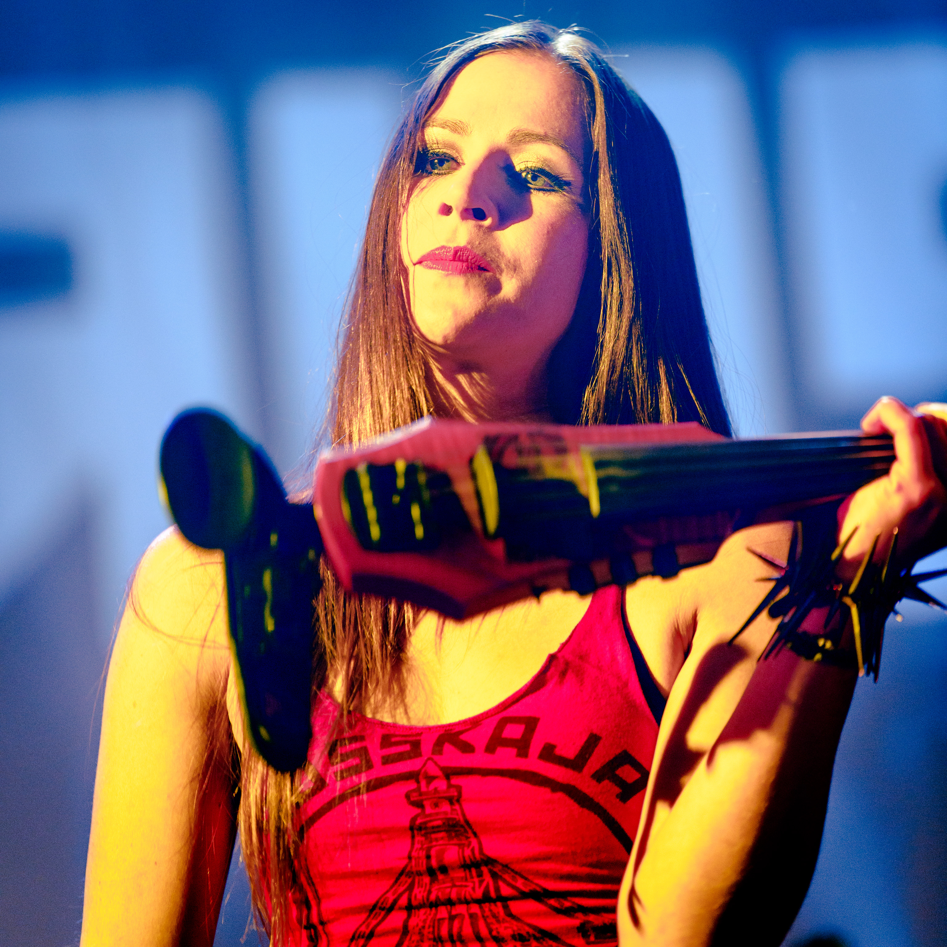 Russkaja in München 2014